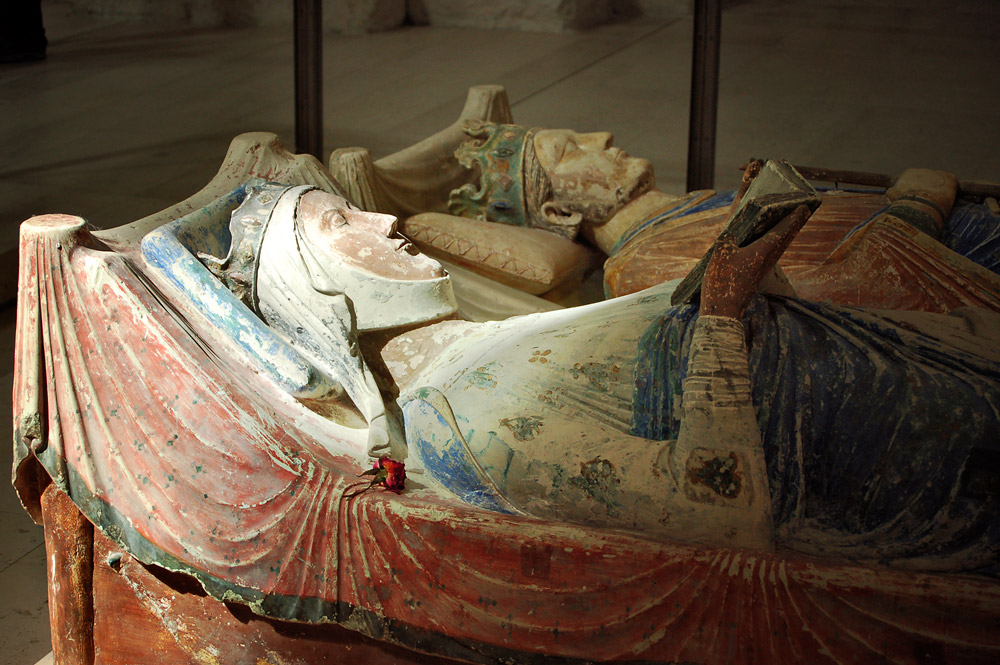 Gisant d'Aliénor d'Aquitaine, au second plan Henri II Plantagenêt, à l'Abbaye de Fontevraud.